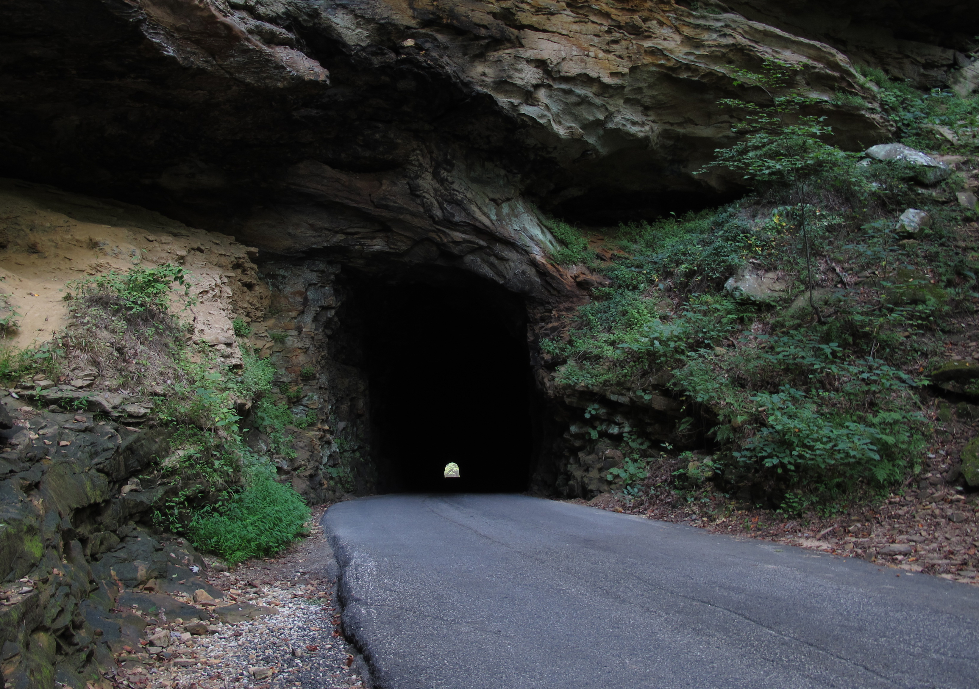 nada tunnel